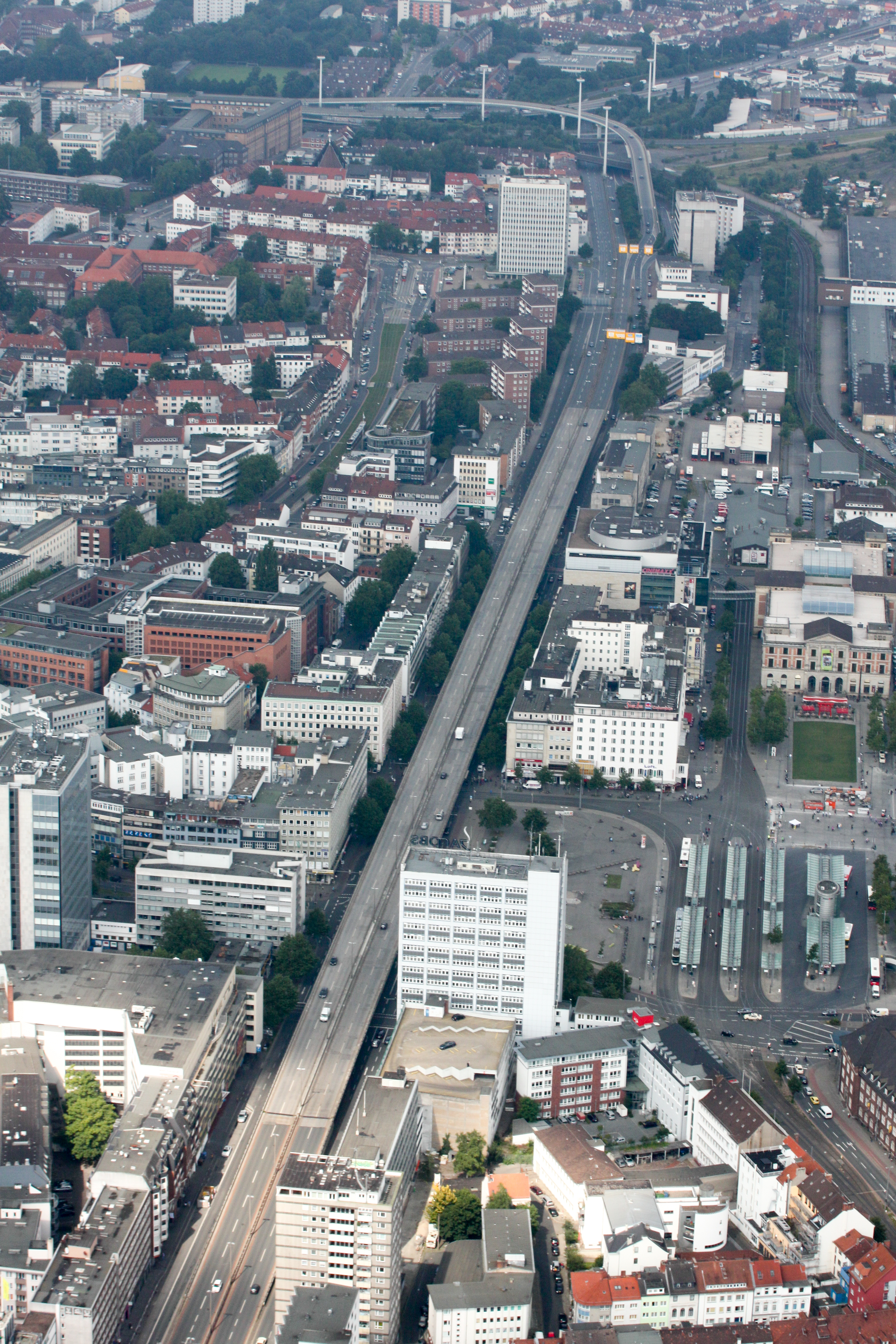 Die Bremer Bahnhofsvorstadt, in der Mitte die Hochstraße Breitenweg, am rechten Bildrand der Bahnhofsvorplatz